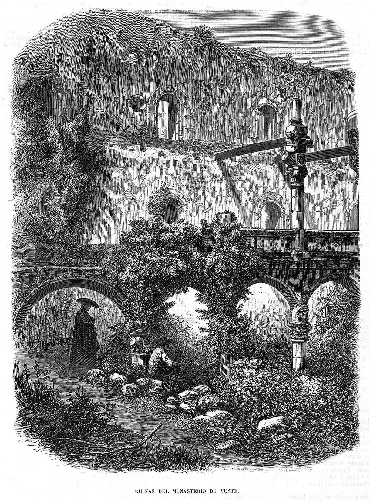 Ruinas del monasterio de Yuste, en la revista española El Museo Universal.